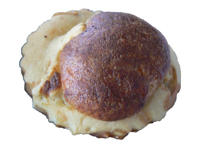 A Menorca el flaó és una pasta salada (com també ho són, per exemple, les formatjades de sobrassada o els robiols d'espinacs o de tonyina) de formatge. No està farcit sinó que el formatge està barrejat amb la massa, que és com un pa o coca. Els flaons menorquins són individuals i de la mida aproximada a la d'un puny.